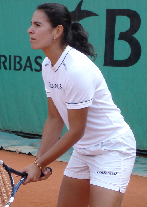 Fabiola Zuluaga à Roland-Garros en 2005